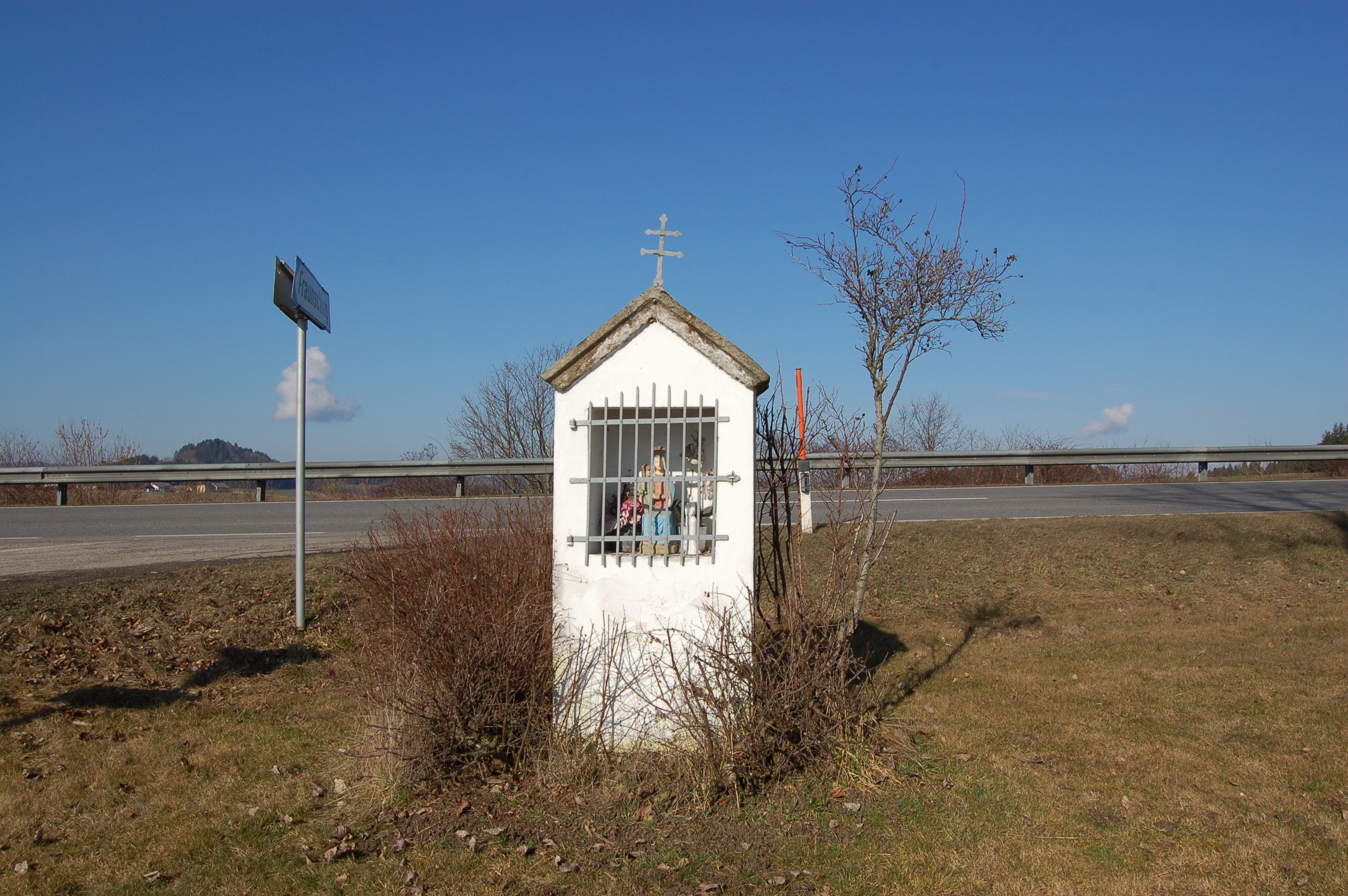 Bildstock bei der östlichen Ortseinfahrt zur Ortschaft Fraunschlag in der Gemeinde Altenfelden, Oberösterreich. Object location48° 30′ 14.29″ N, 13° 58′ 22.08″ E